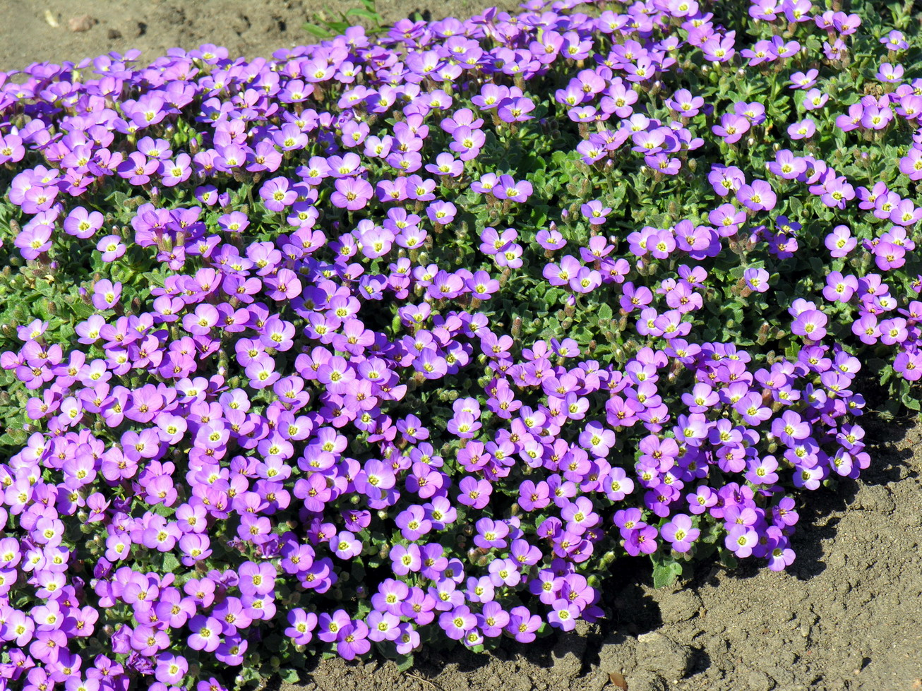 Aubretė (Aubrieta) Fotografavo: Algirdas, 2006 m. gegužės 10 d., Lietuva